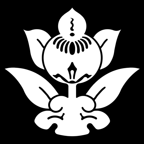 「根上り橘」紋（染抜）